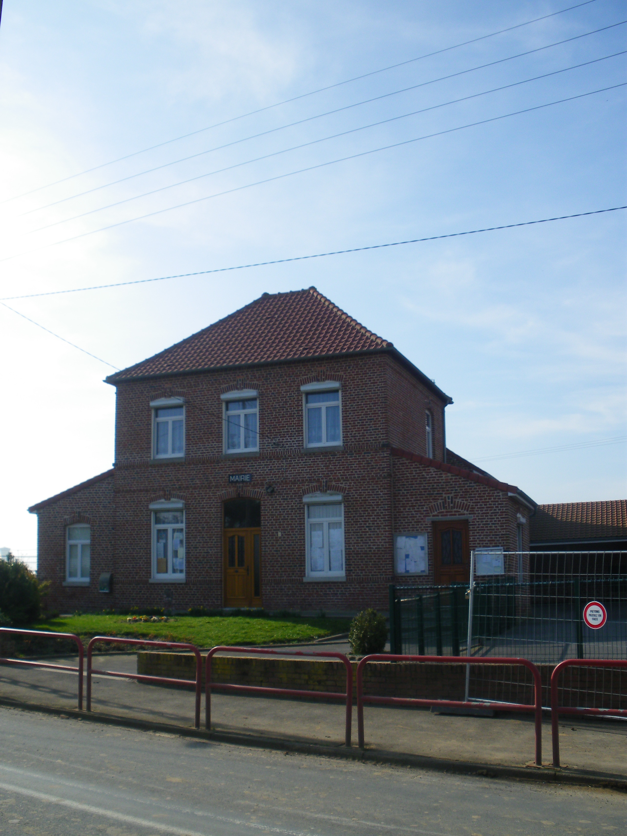 Vue de la mairie de Zermezeele.